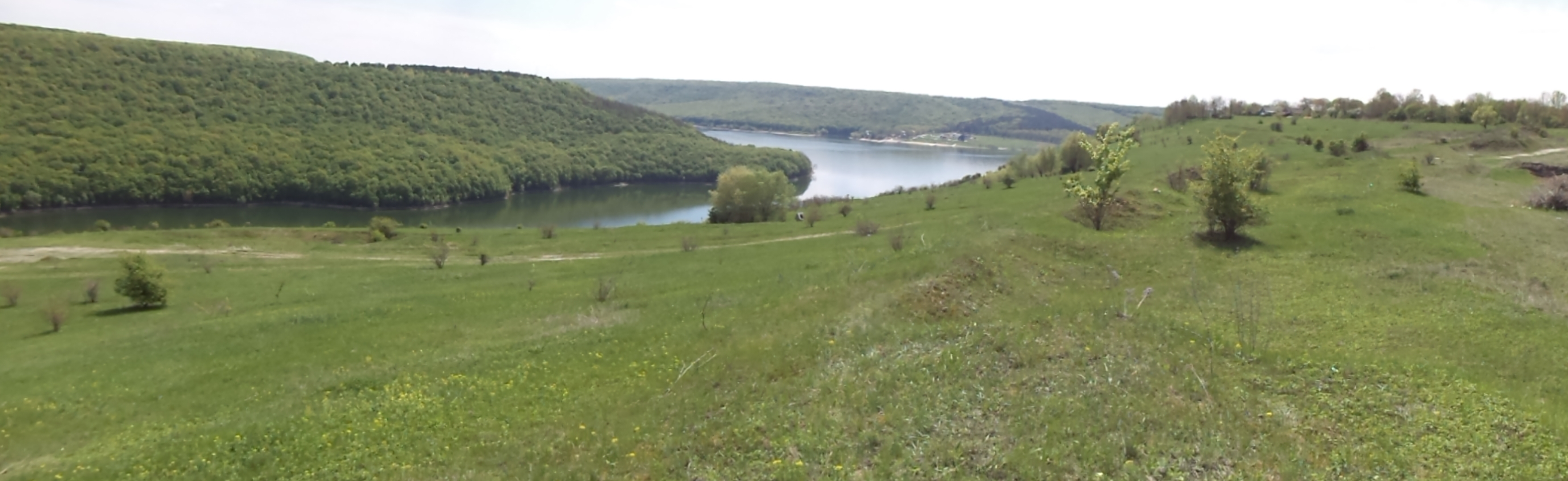 Кут - східна околиця с. Рудківці. На задньому плані за Дністром Чернівецька область. Зліва за річкою Матіркою Вінницька область. Долини річок заповнені водами Дністровського водосховища.